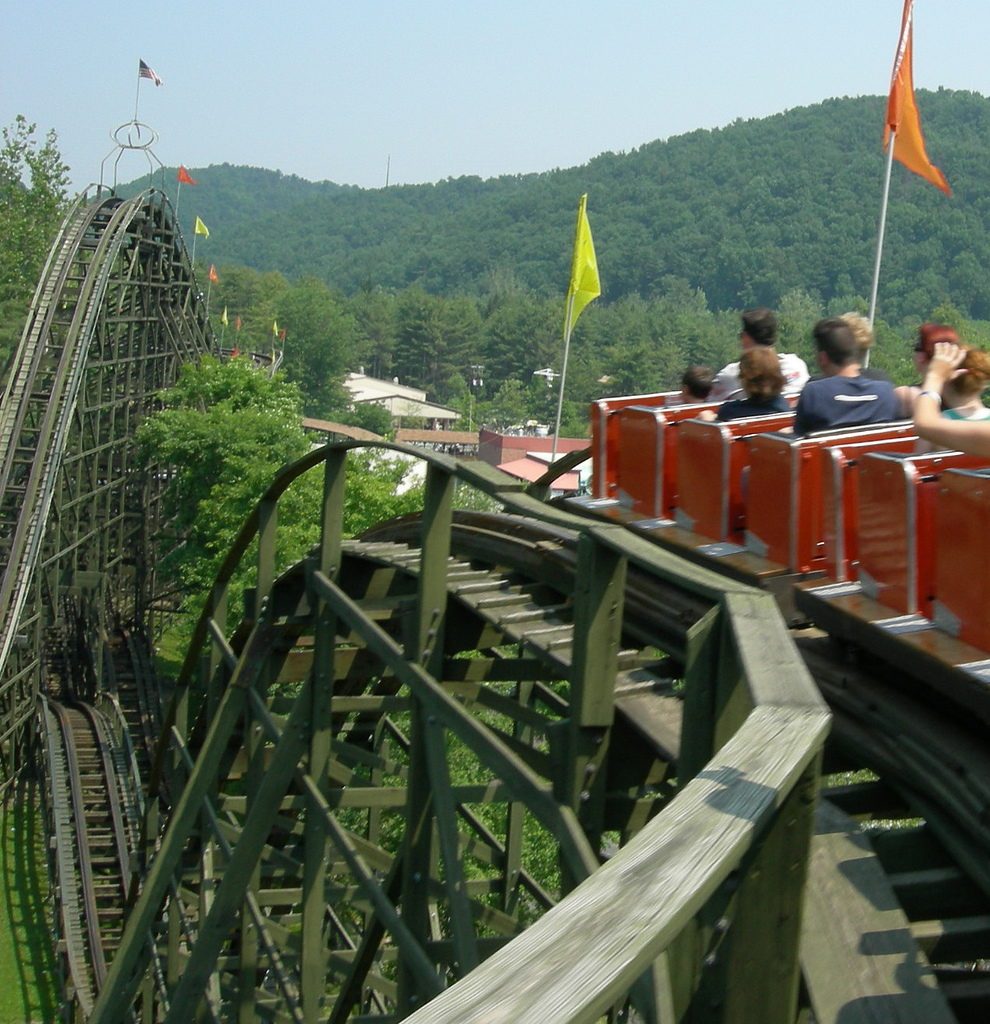 More Phoenix